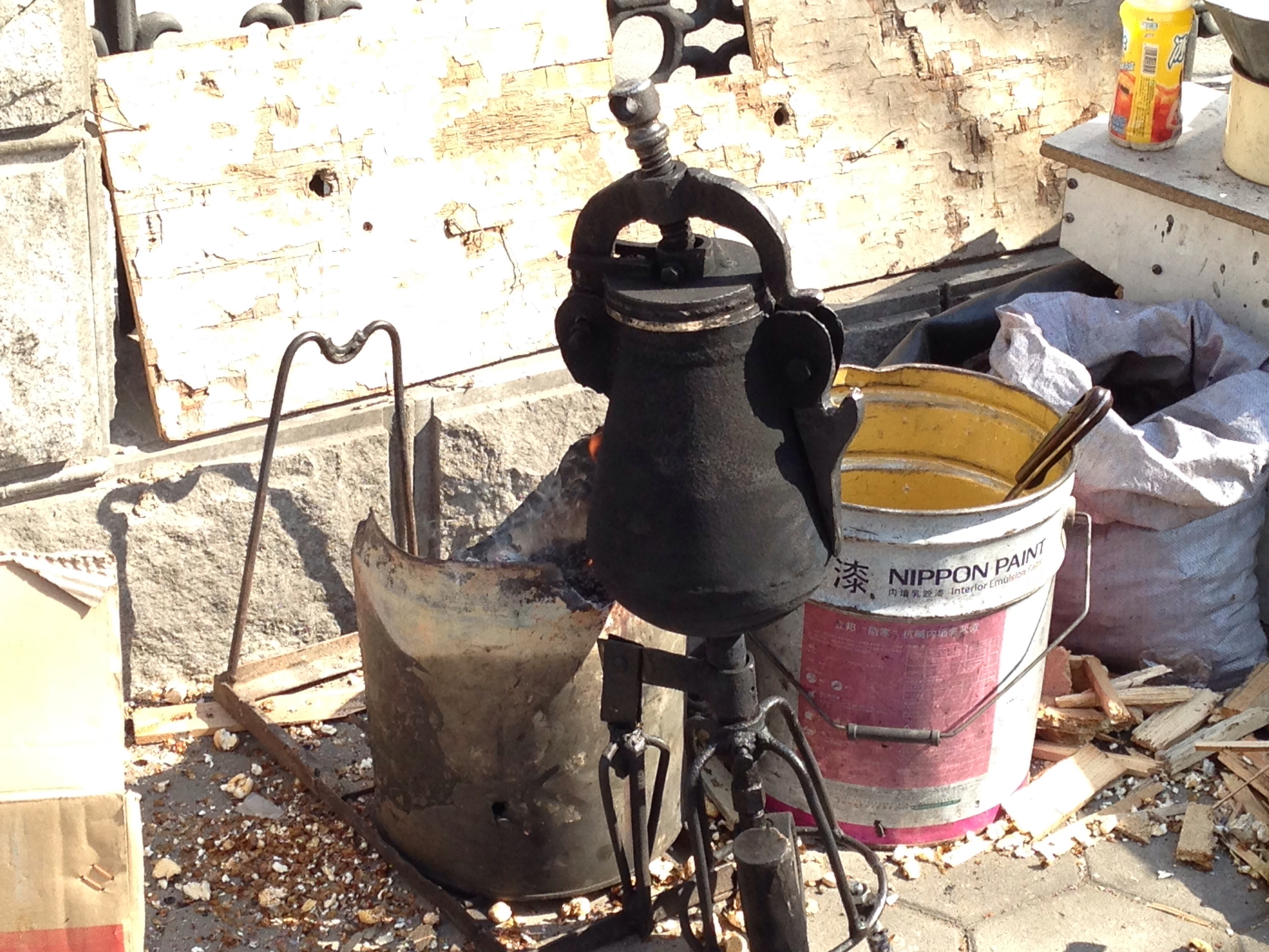 中文（中国大陆）: 中国常见的老式爆米花机